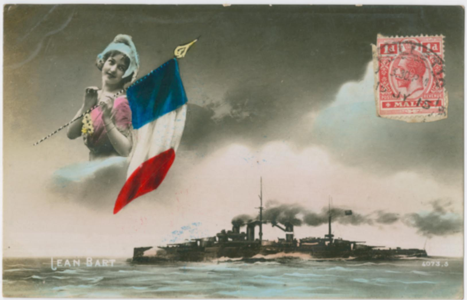 Henri HÉRIOT est né à Dijon en 1893. Il habite brièvement à Vierzon après-guerre, avant de partir s'installer à Orléans. De 1914 à 1919, il sert dans la Marine Nationale, sur au moins 4 navires, dont le sous-marin "Rubis" et le cuirassé "Jean-Bart". Henri HÉRIOT est membre de l'association universelle d'espéranto (UEA, Universala Esperanto Asocio). A ce titre, il a accumulé une importante collection de cartes postales provenant de multiples pays qui s'ajoutent à celles qu'il a lui-même envoyées pendant la guerre.